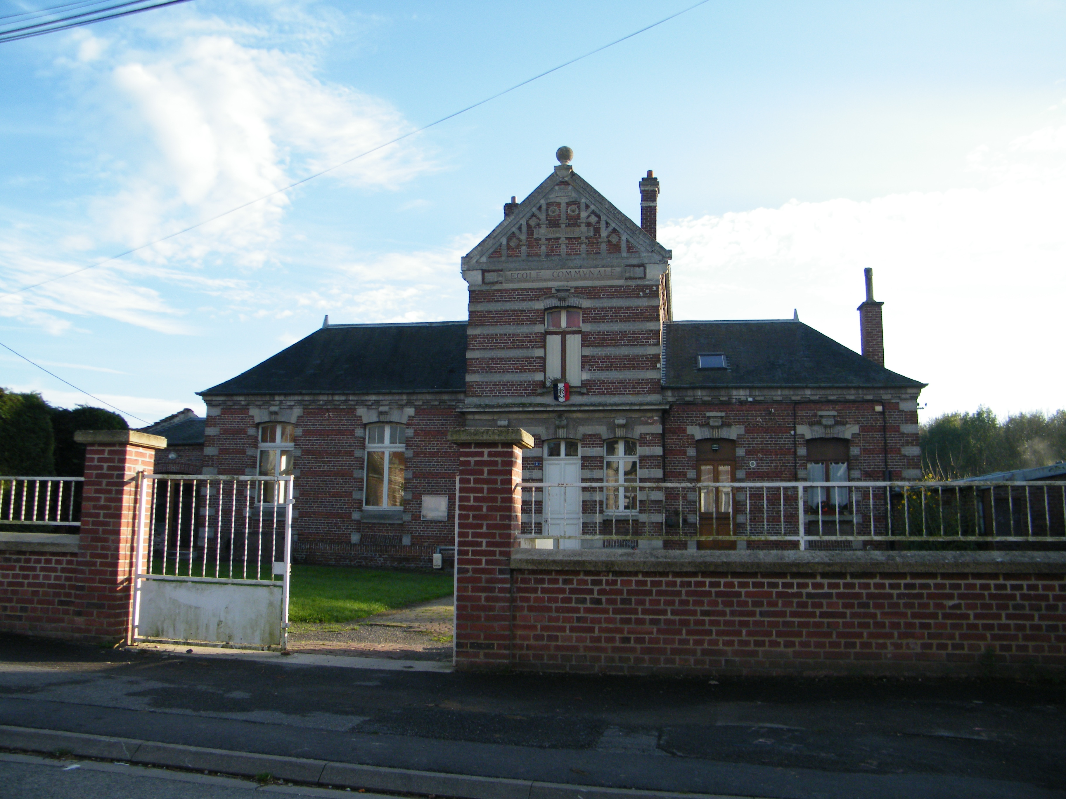 Mairie-école.